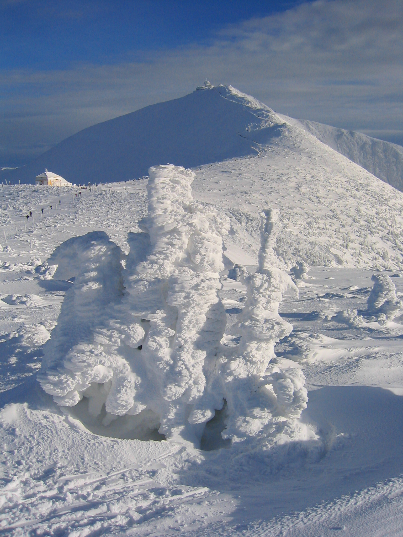 Sněžka